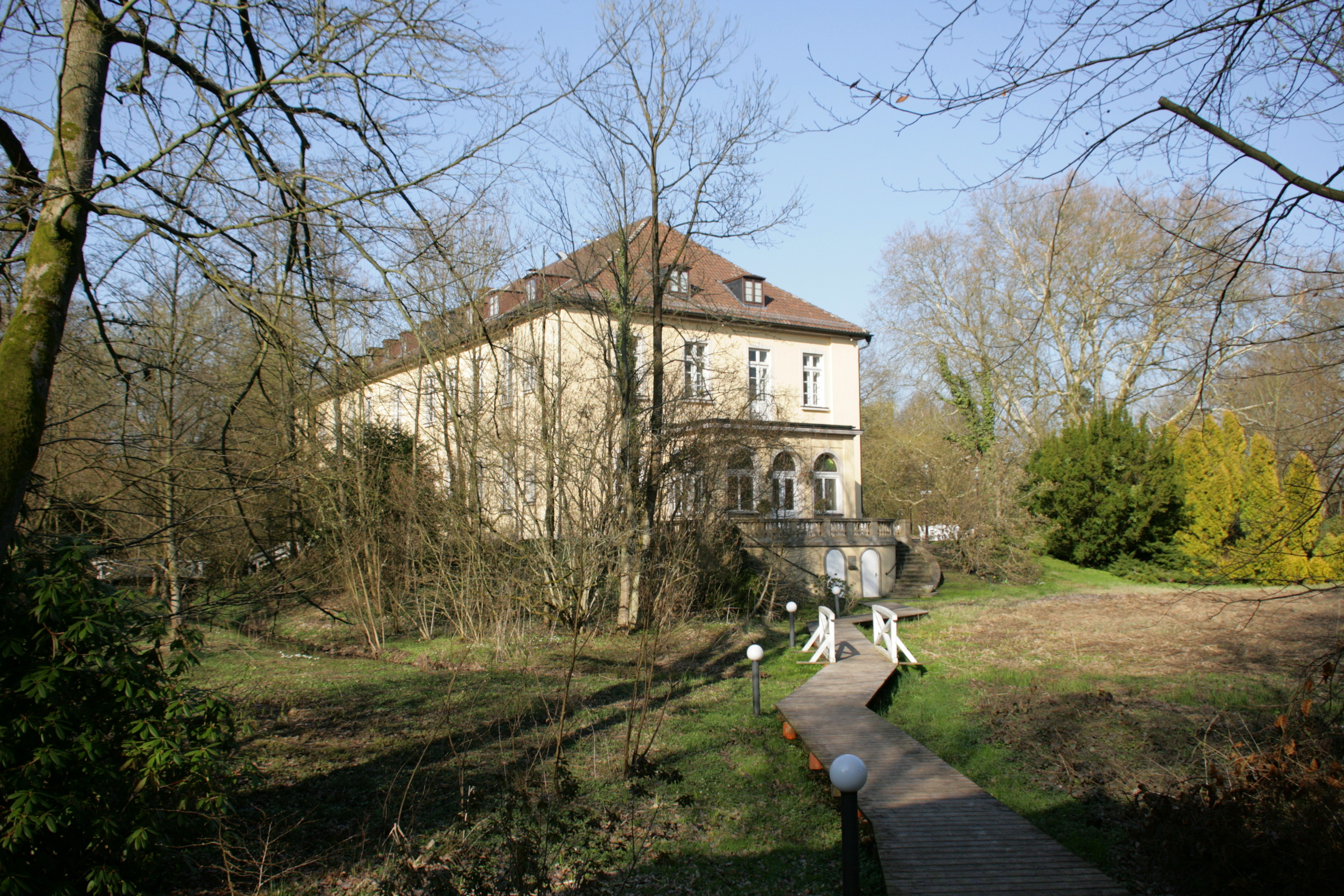 Schloss Holdenstedt, Schloßstraße 4 in Holdenstedt, Uelzen